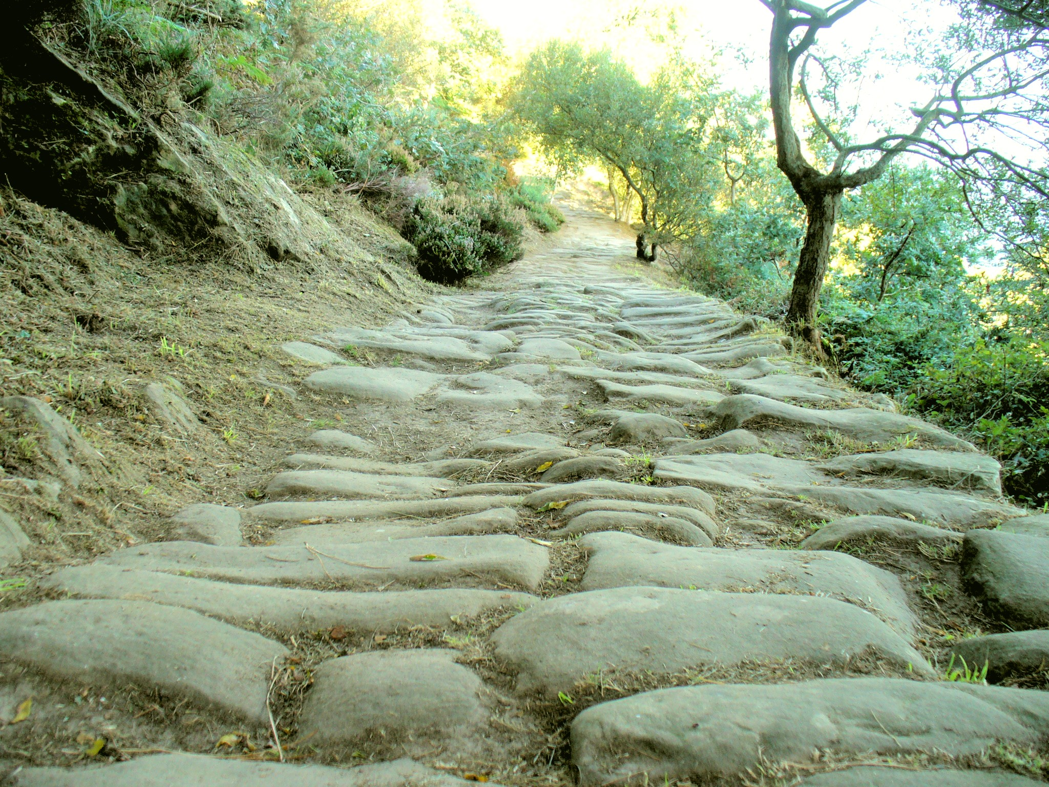 Avenida Josetxo, vieja calzada utilizada para la extración de piedra en el monte Ulia